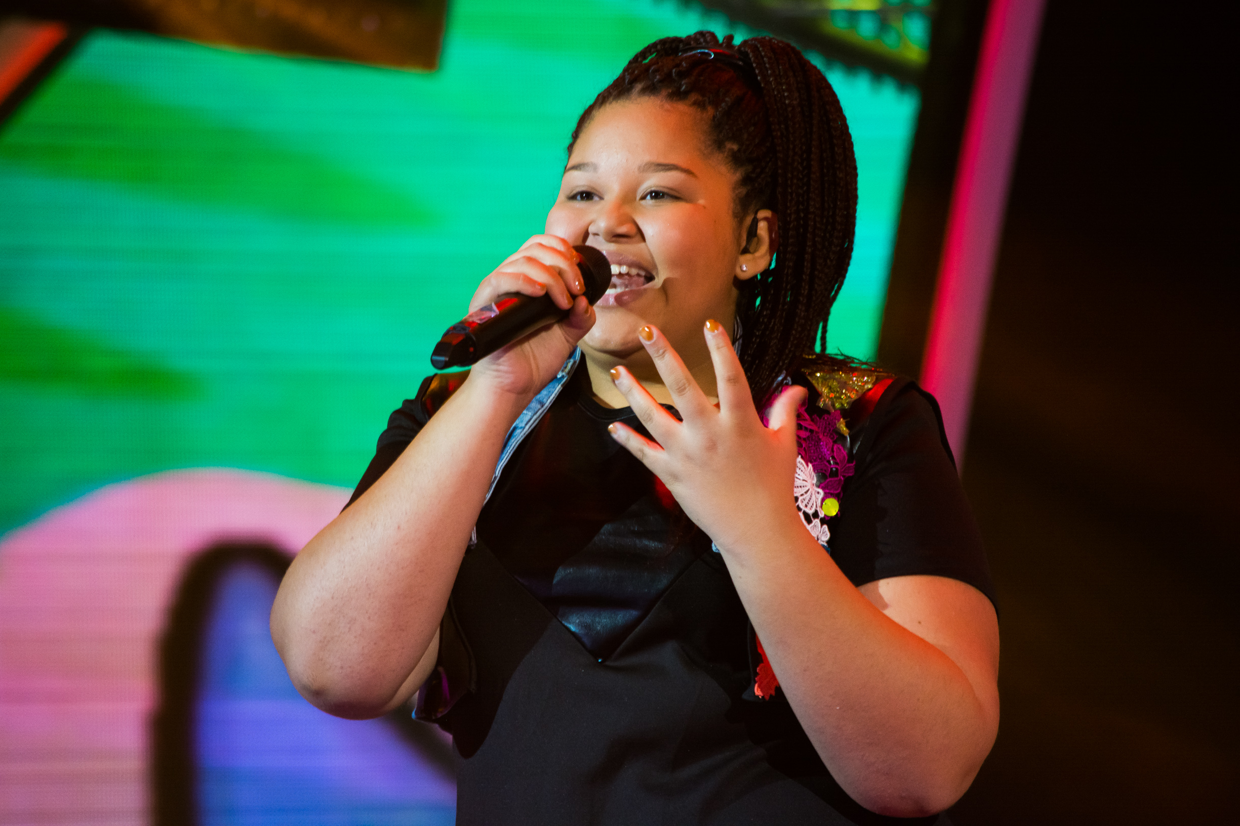 Дестини Чукуньере на сцене Детского Евровидения 2015 («Армеец», София) во время генеральной репетиции